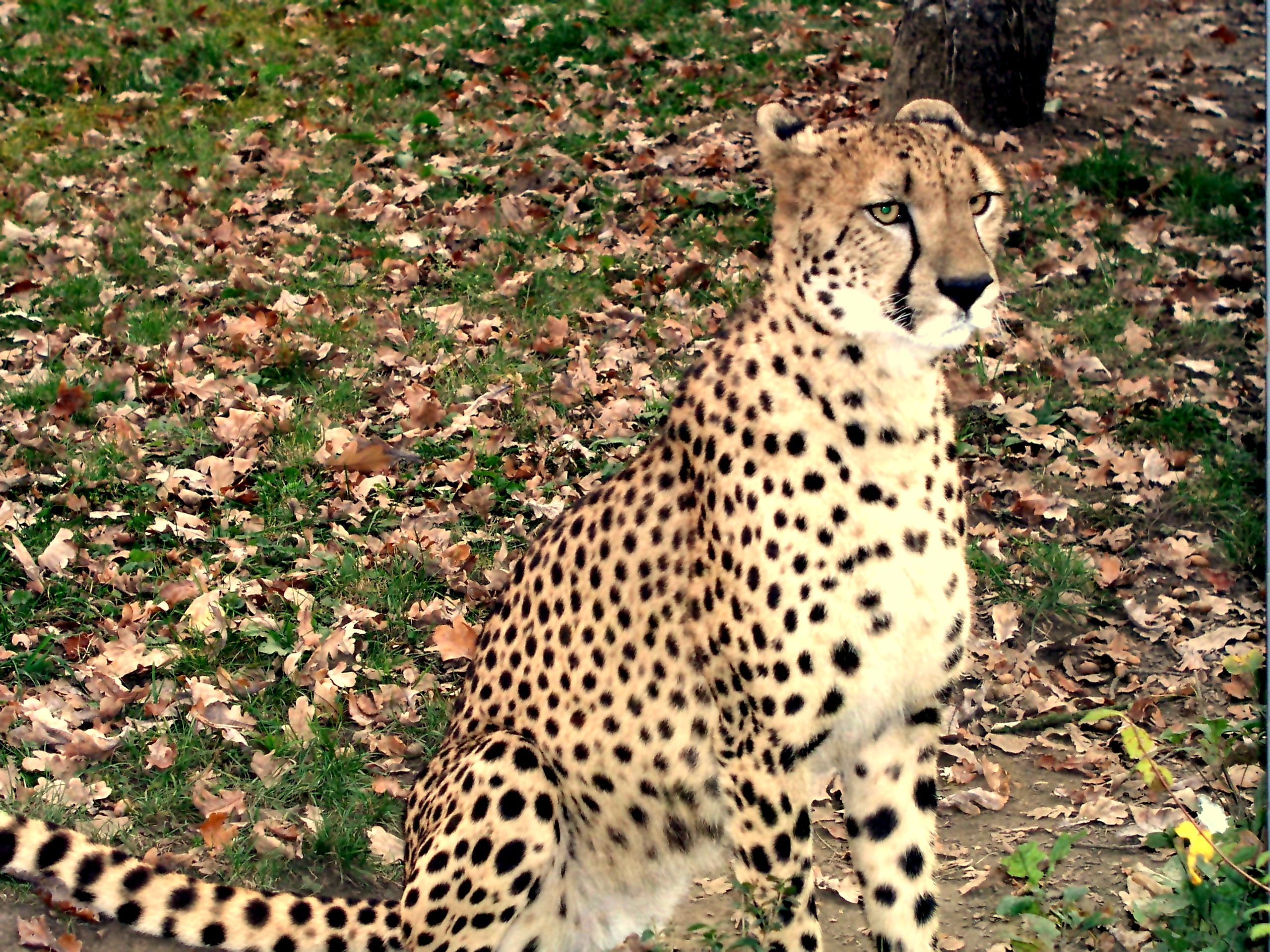 Acinonyx jubatus, cheetah, gepard